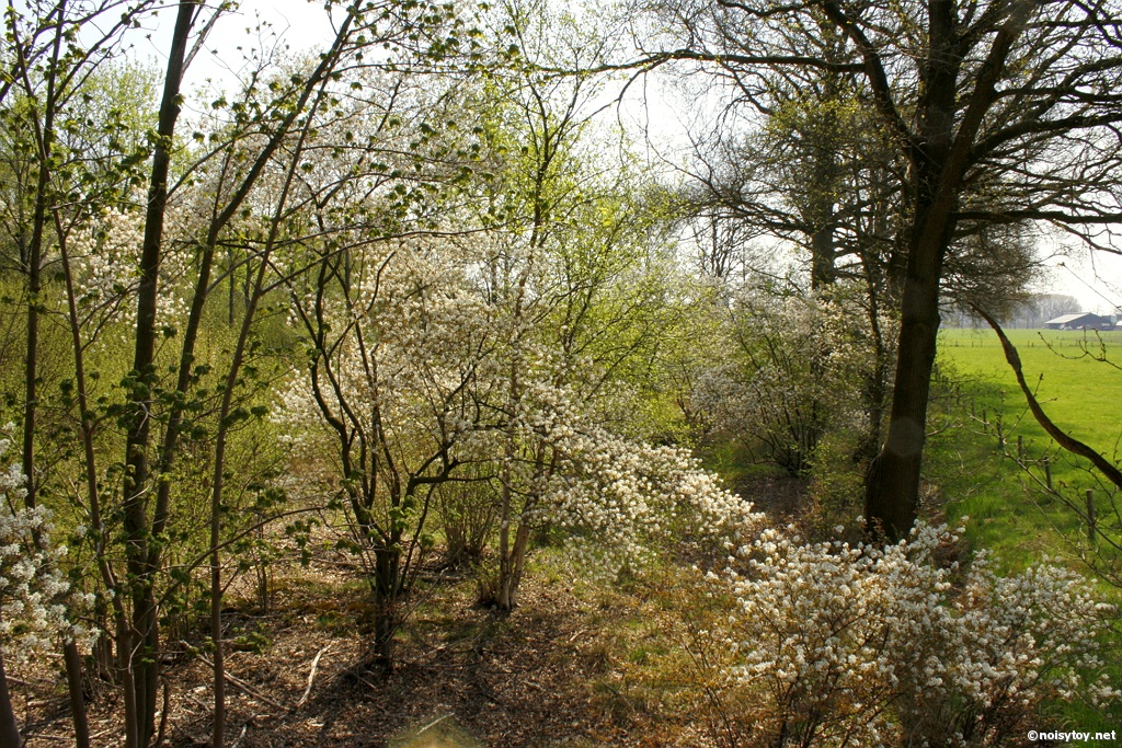 De Brand in bloei